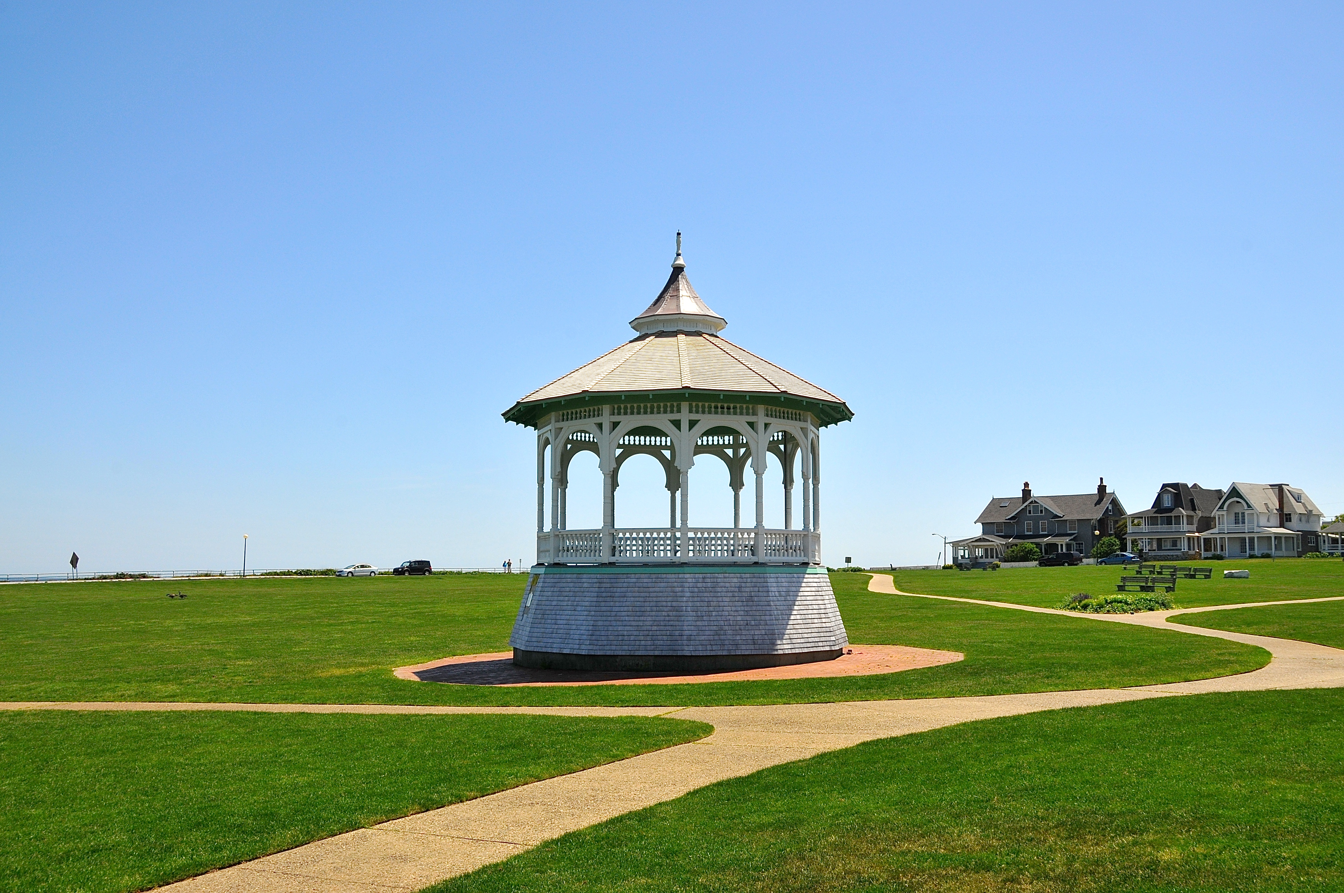 Arbour - Oak Bluffs MA